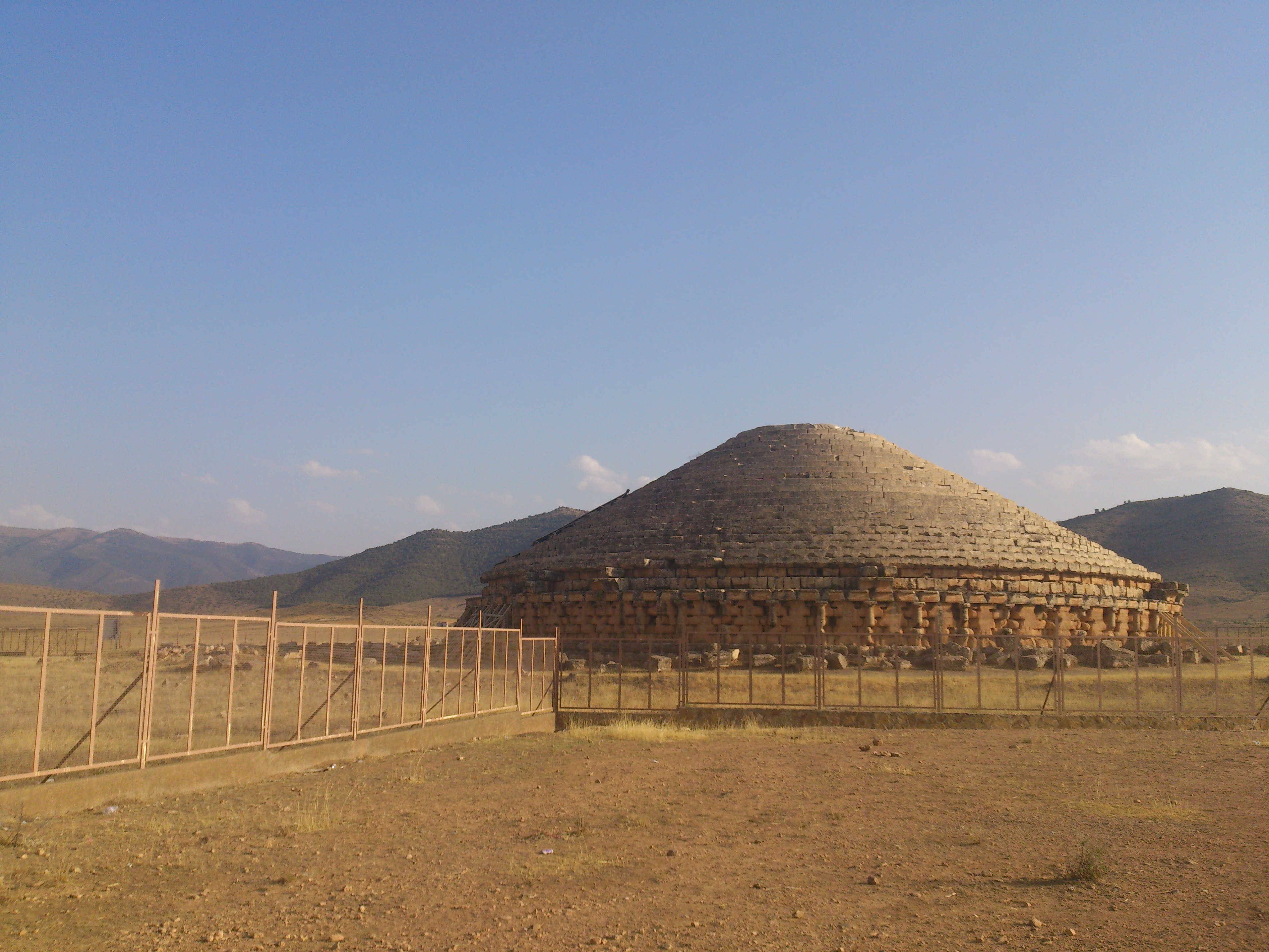 Mausolée des Rois numides dit le Medracen